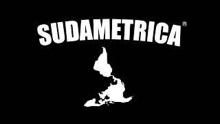 Logo oficial de Sudametrica.